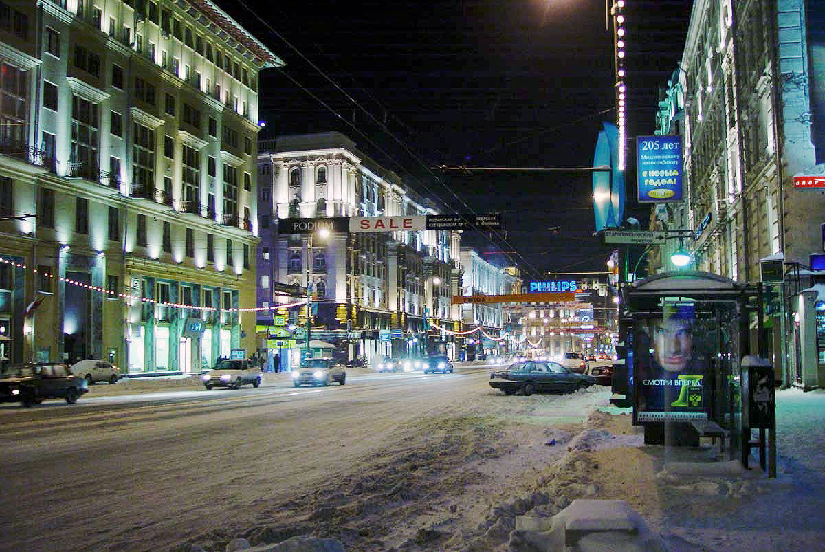 Зимний вечер на Тверской.